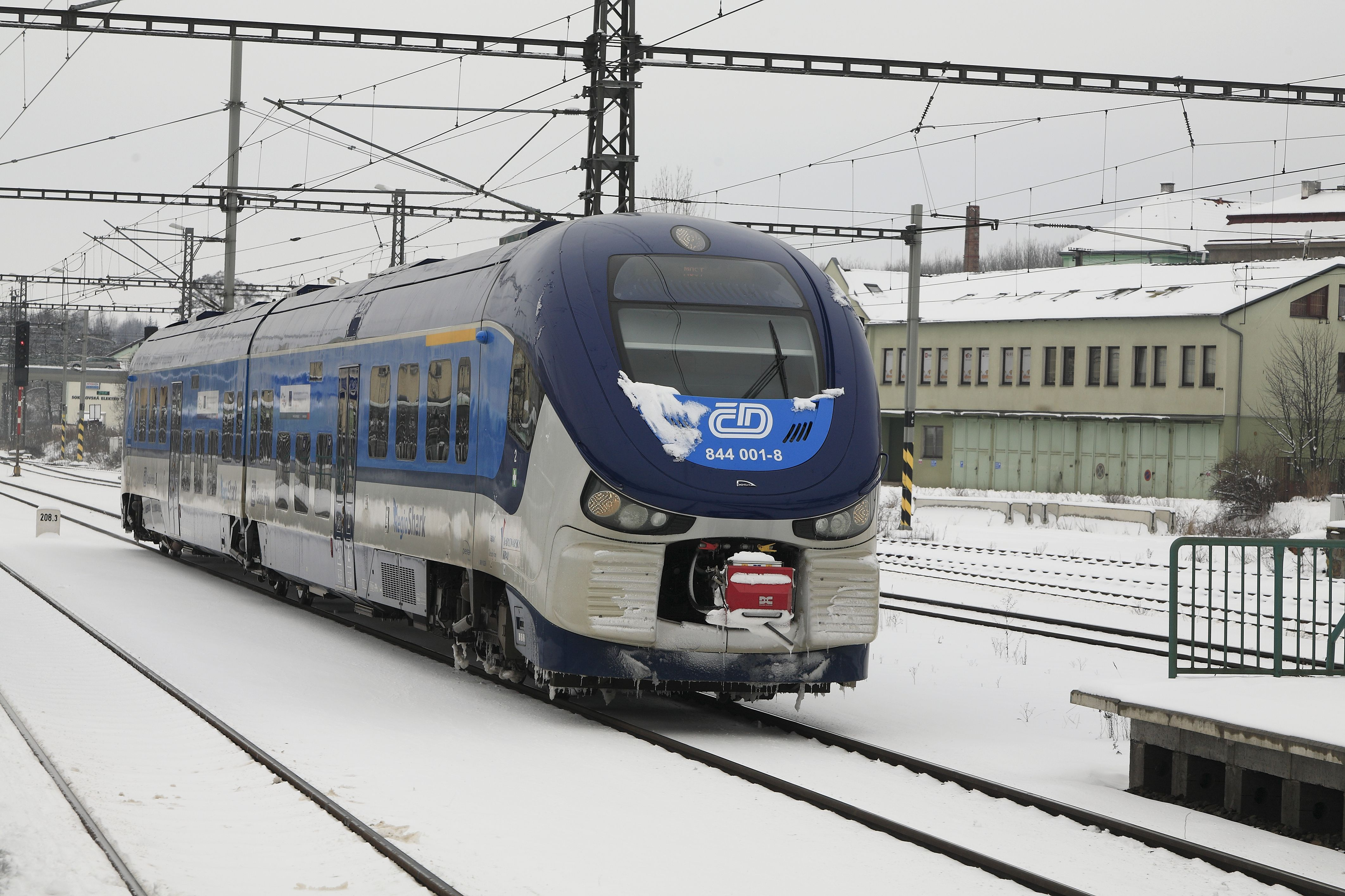 Personenzug Cheb/Eger–Most/Brüx (StreckeChomutov–Cheb) bei der Einfahrt. Die Strecke ist durchgehend elektrifiziert, trotzdem verkehren Dieseltriebwagen. Vermutlich besitzt die ČD nicht ausreichend Zweisystemtriebewagen für den Regionalverkehr.